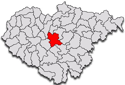 Categorie:Hărţi ale judeţului Sălaj